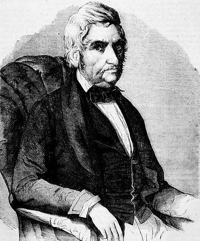 Jan Nepomucen Kamiński